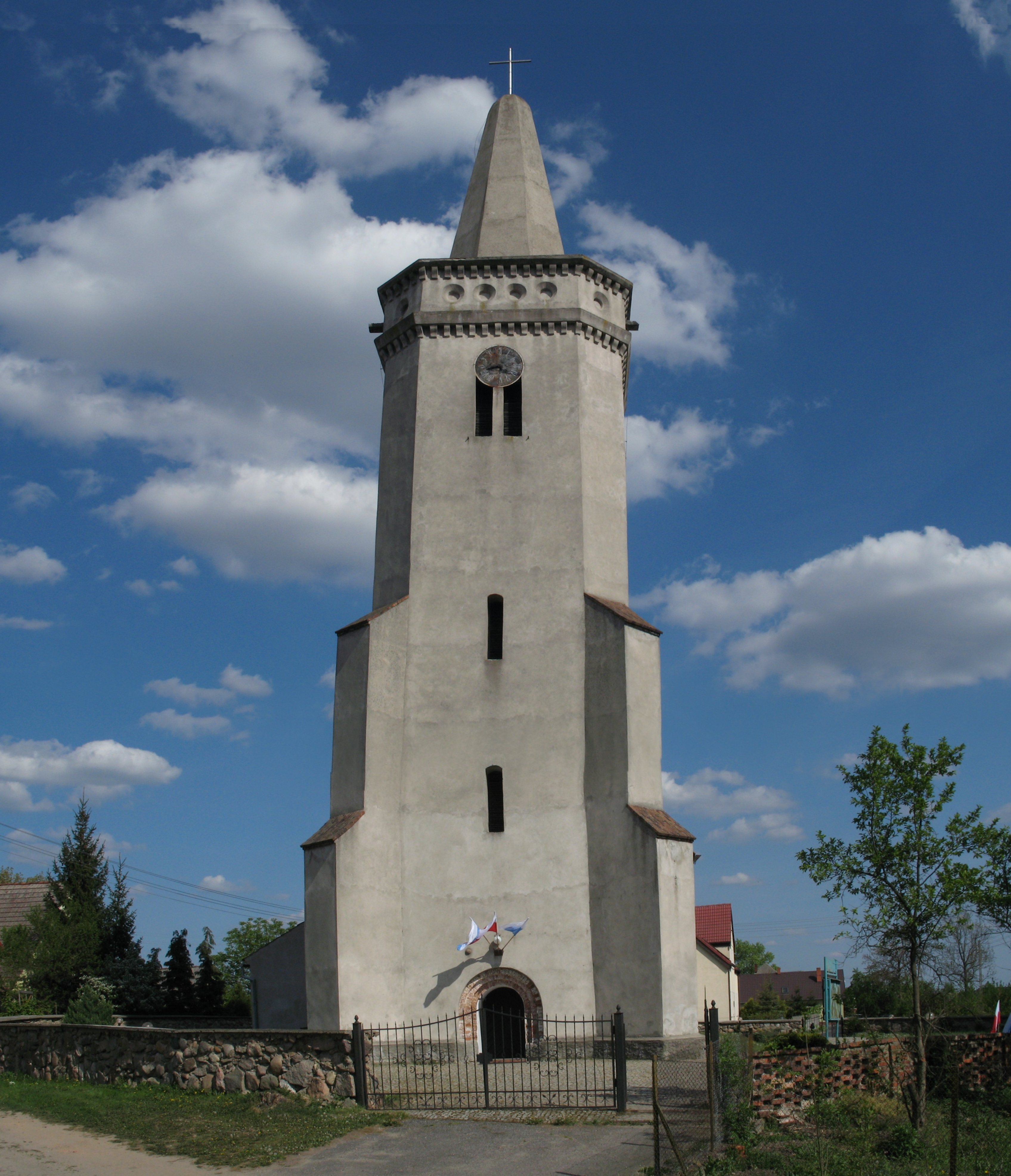 Koźla - kościół parafialny p.w. św. Jadwigi, mur., XV, XVI, XIX w. (zabytek nr rejestr. 1759)